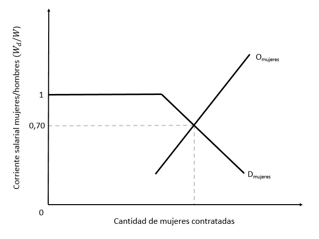 Ejemplo gráfico del modelo del gusto por la discriminación de Gary Becker